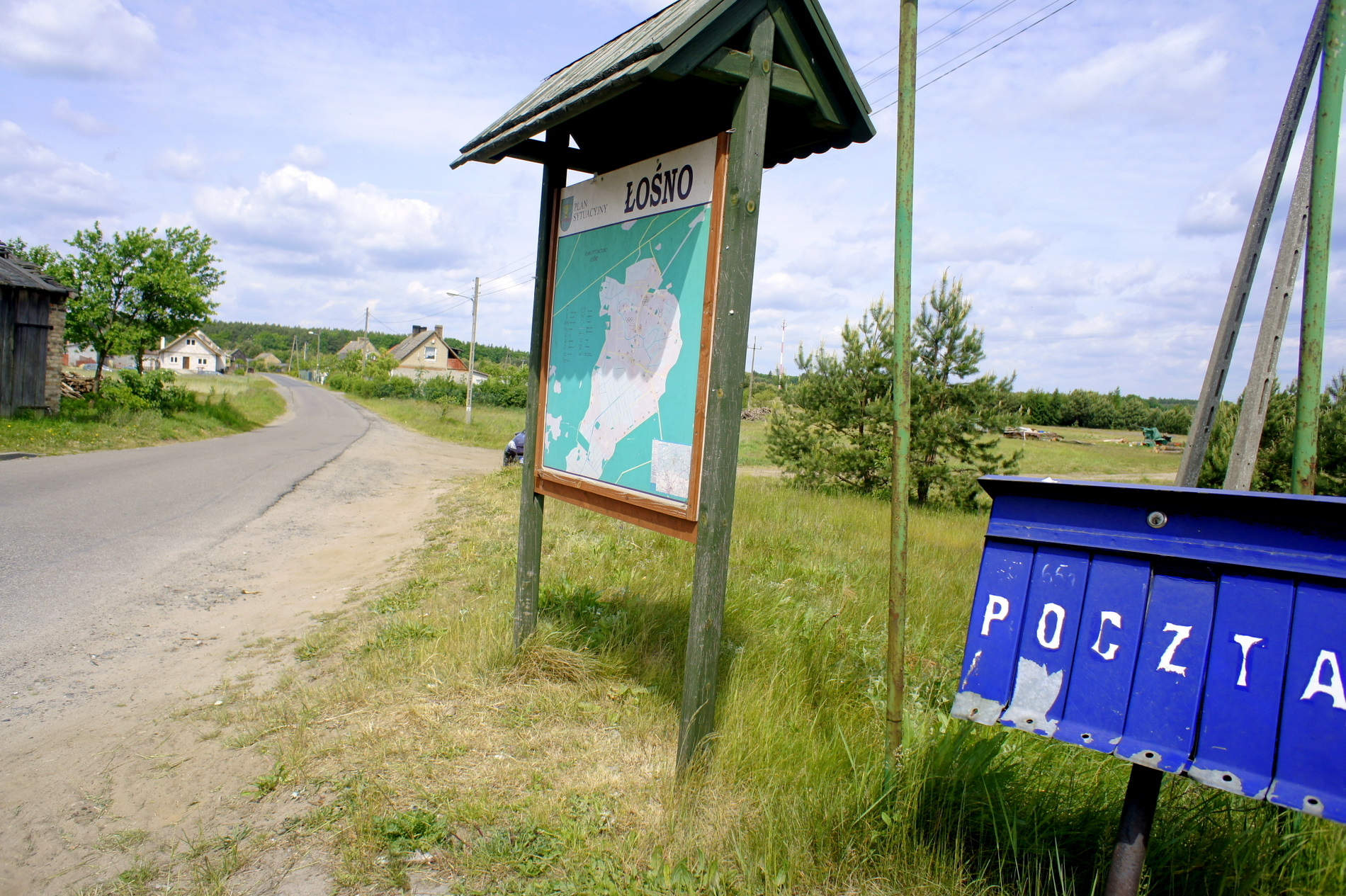 Łośno w gm. Kłodawa, woj.lubuskie